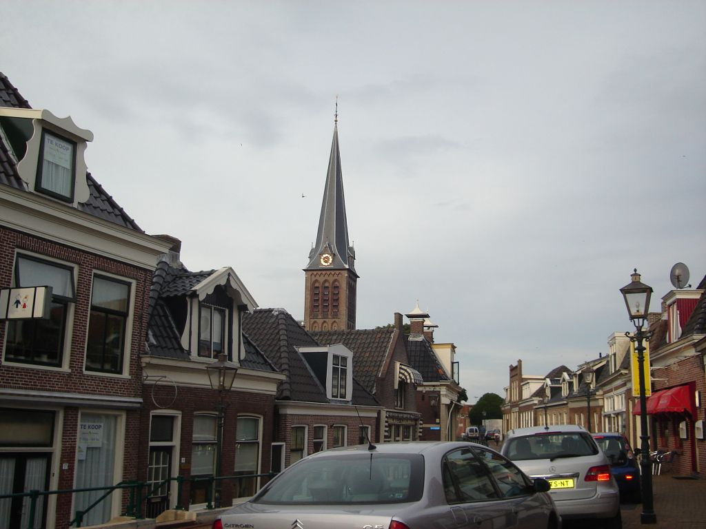 Kościół katolicki w Lemmer